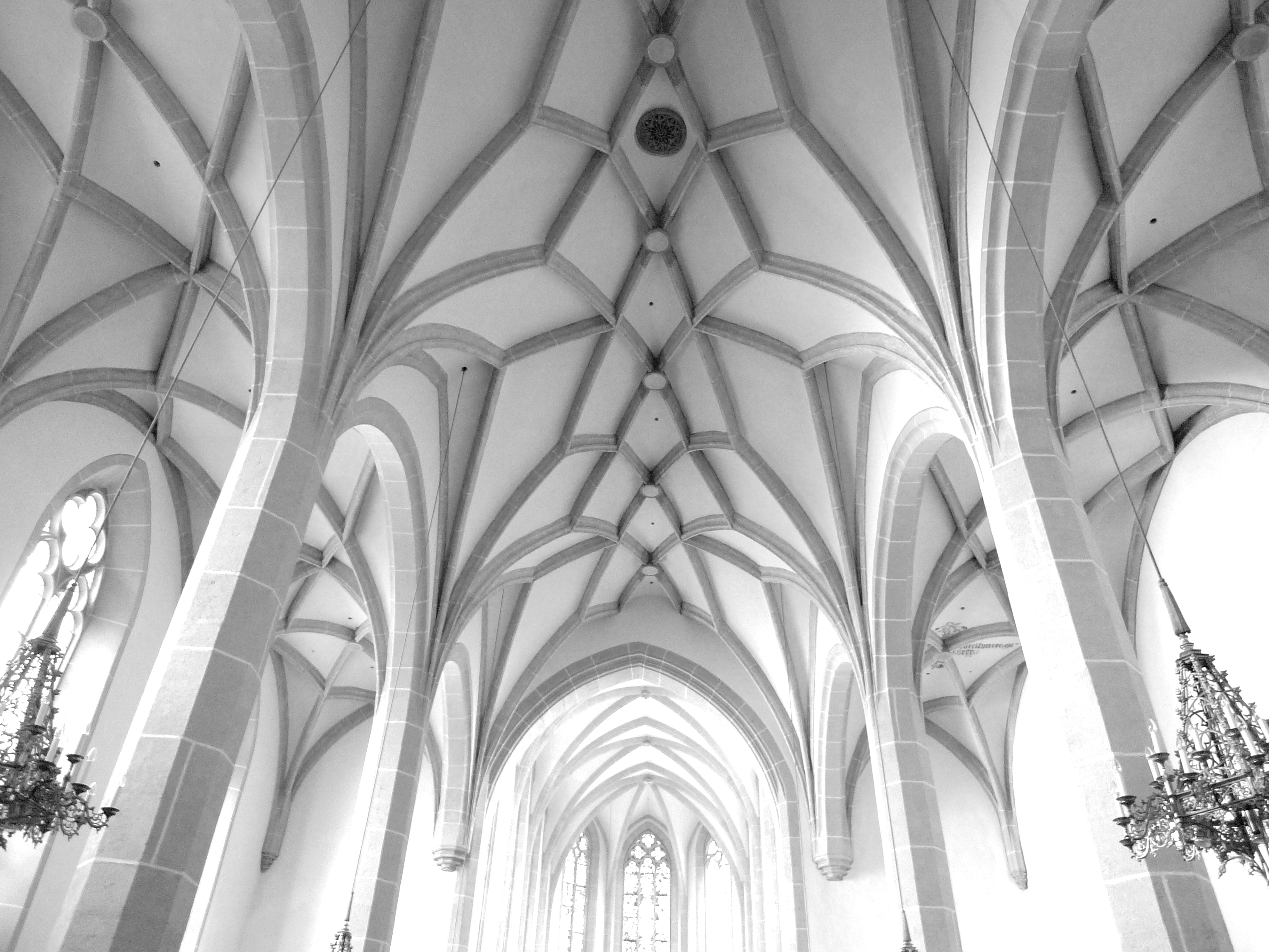 Franziskanerkirche, Pfarrkirche Mariae Himmelfahrt und Teile der ehem. Stadtm.